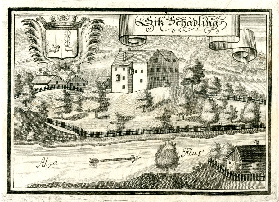 “Sitz Schädling” (ehem. Schloß Schedling), aus: Beschreibung des Churfürsten- u. Hertzogthumbs Ober- und Nidern Bayrn. Rentamt München, 2. Auflage um 1750 (1. Auflage erschien 1701)